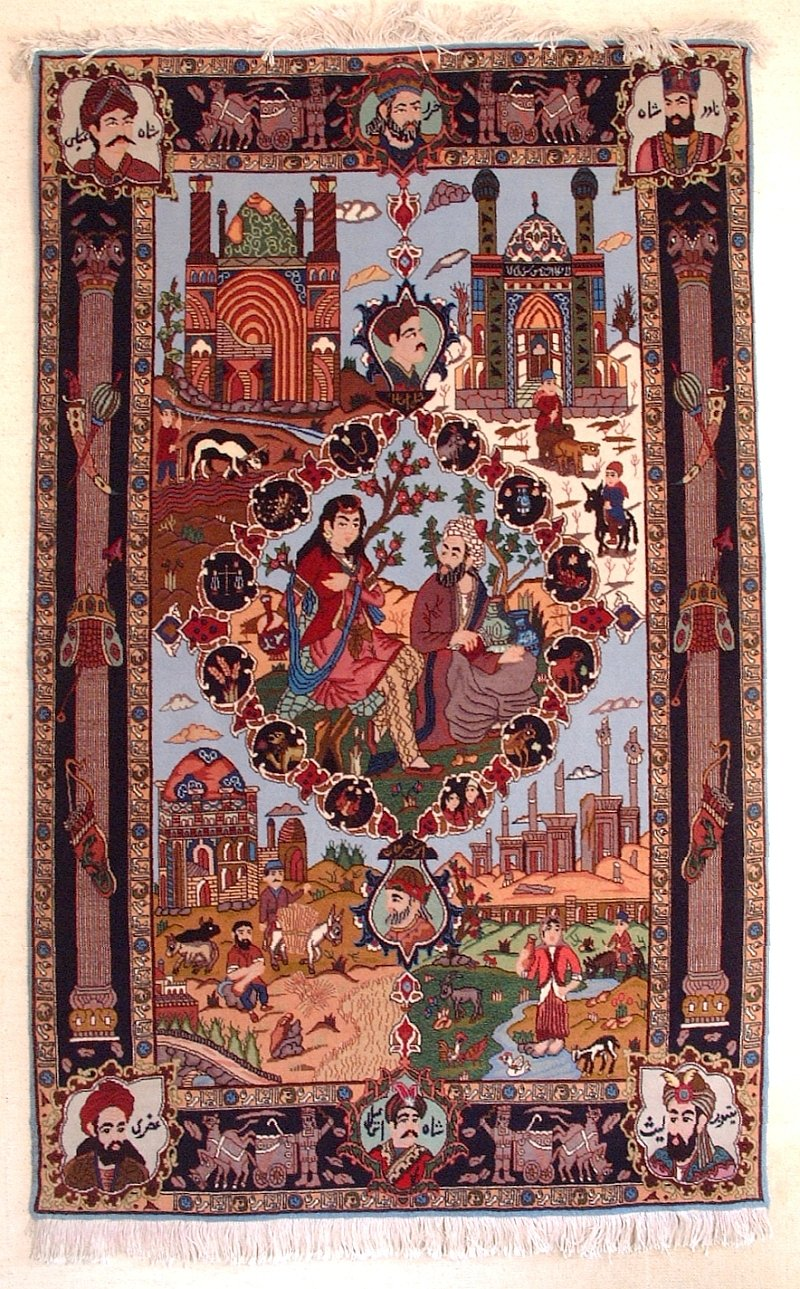 Deze foto van mijn eigen tapijt heb ik zelf gemaakt, u kunt deze foto ook vinden op mijn site ( met een beschrijving van de restauratie van het kleed. Correspondentie over het gebruik van deze foto kunt u voeren via de contactpagina van: Arie M. den Toom Ridderkerk 10 januari 2006